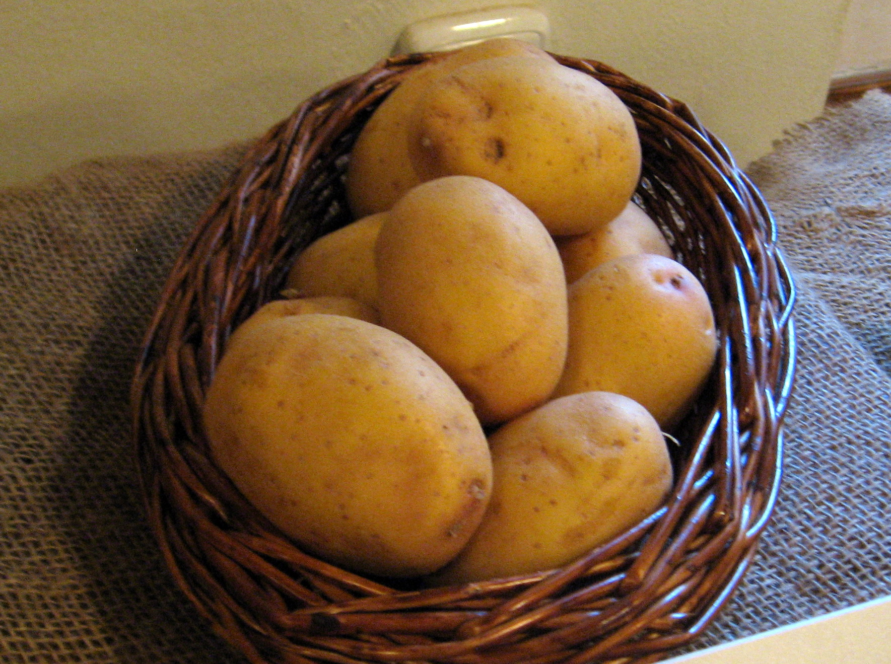 odrůda Jelly (Potatoes of the "Jelly" variety)